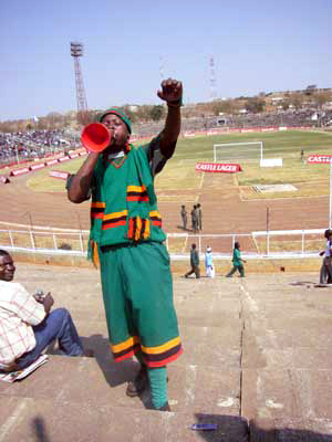 Zambiafan in Indepence Stadium